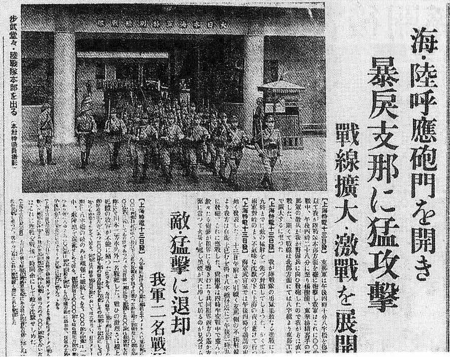 第二次上海事変勃発を報道する東京朝日新聞昭和十二年八月十四日付の紙面、「暴戻支那」とは中華民国に対する敵愾心を持った表現である。